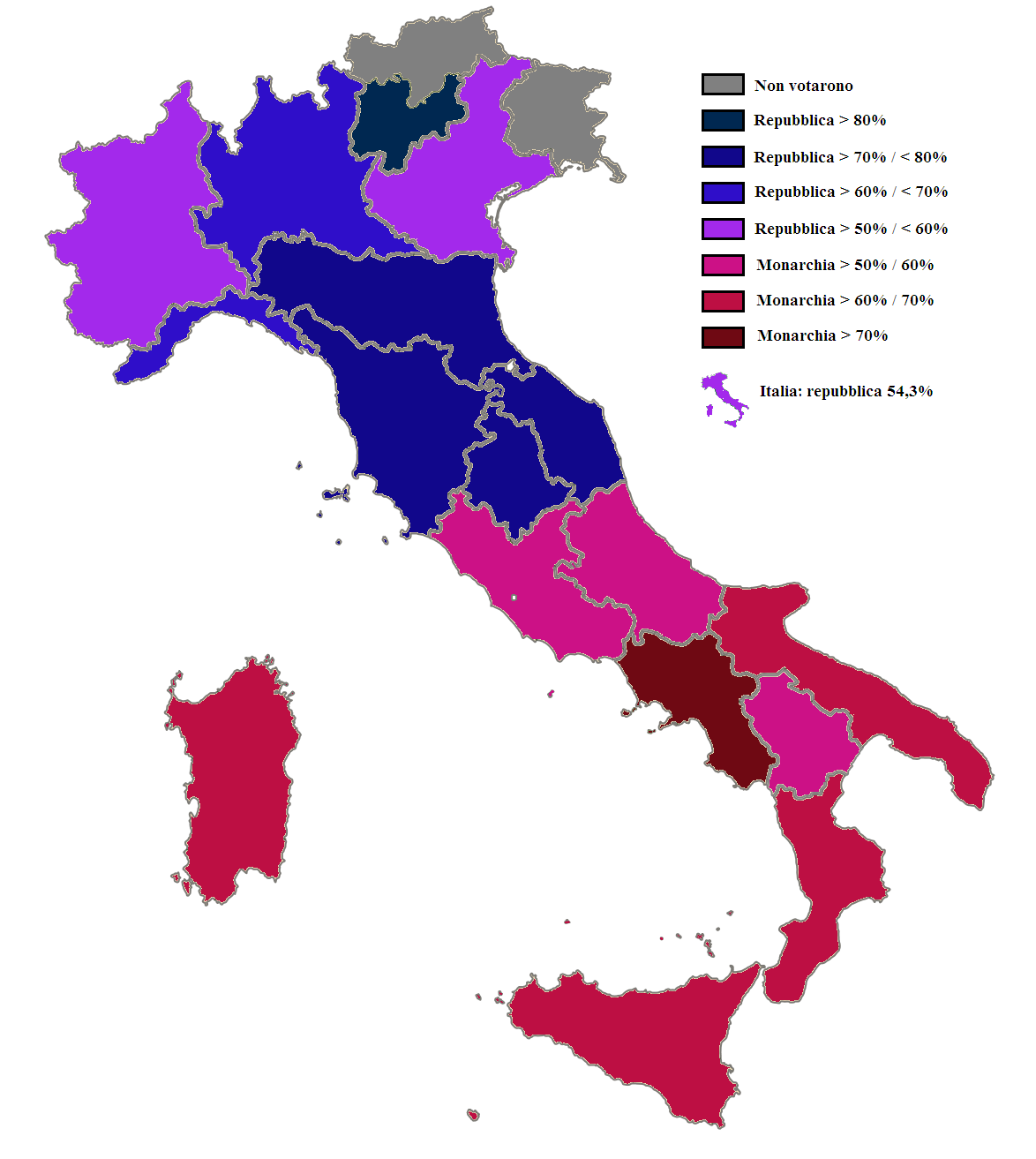 Mappa che mostra i risultati del referendum del 2 giugno 1946, mostrando le preferenze monarchiche o repubblicane di ogni regione. La Venezia Giulia e l'Alto Adige non parteciparono al referendum poichè occupate dalle Nazioni Unite. La cartina segna che Valle d'Aosta partecipò essendo ancora parte del Piemonte, ma è un DATO FALSO, la regione essendo già nata il 1° gennaio 1946. Abruzzi e Molise erano ancora un'unica regione. Dati dall'articolo Nascita della Repubblica Italiana.